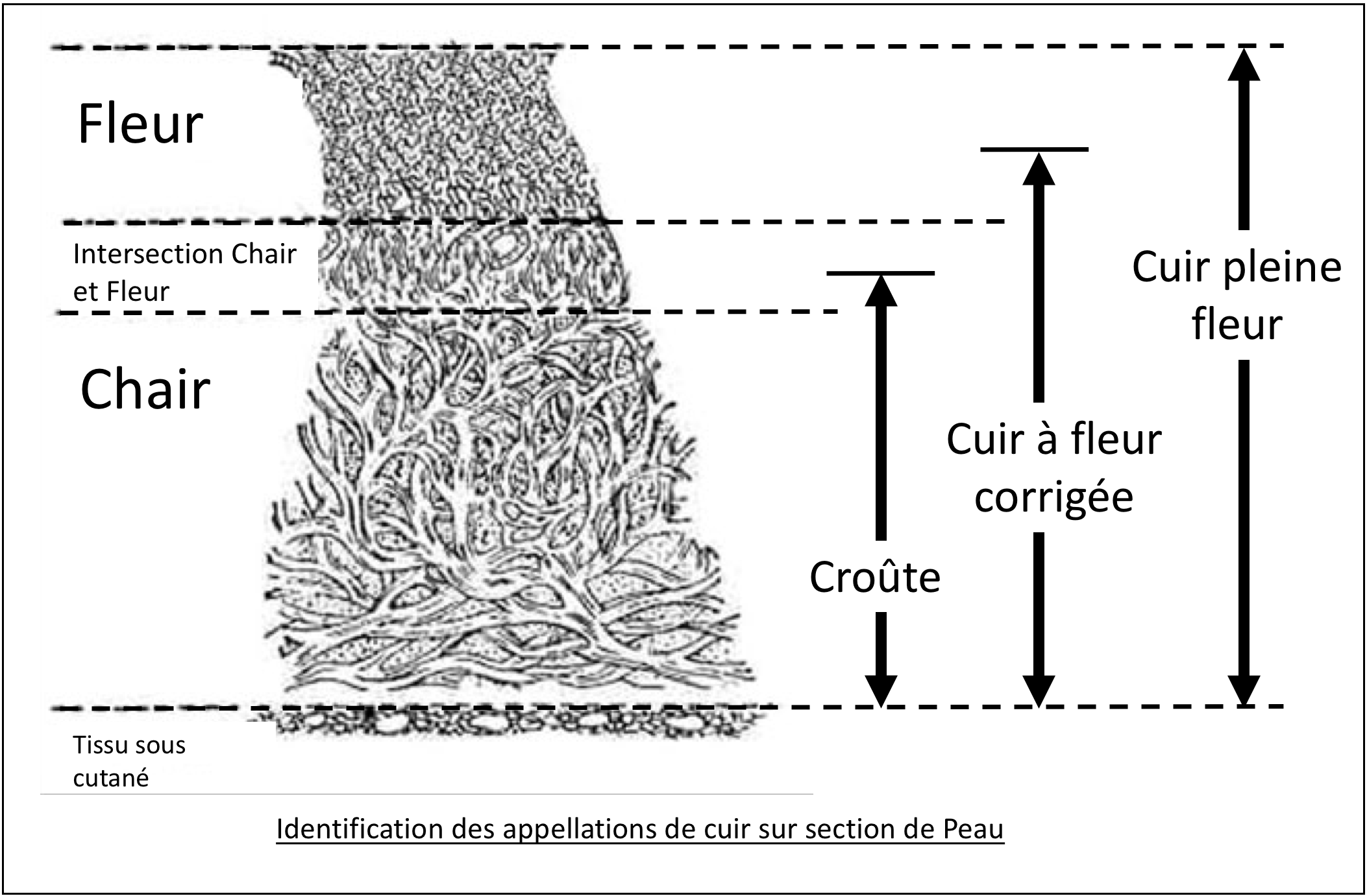 Cuir pleine fleur Cuir au tannage végétal Cuir à fleur corrigée Croûte Chair Fleur